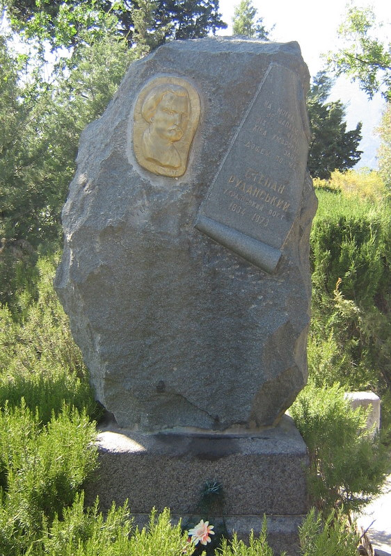 Надгробок Степана Руданського на Полікурівському меморіалі в Ялті